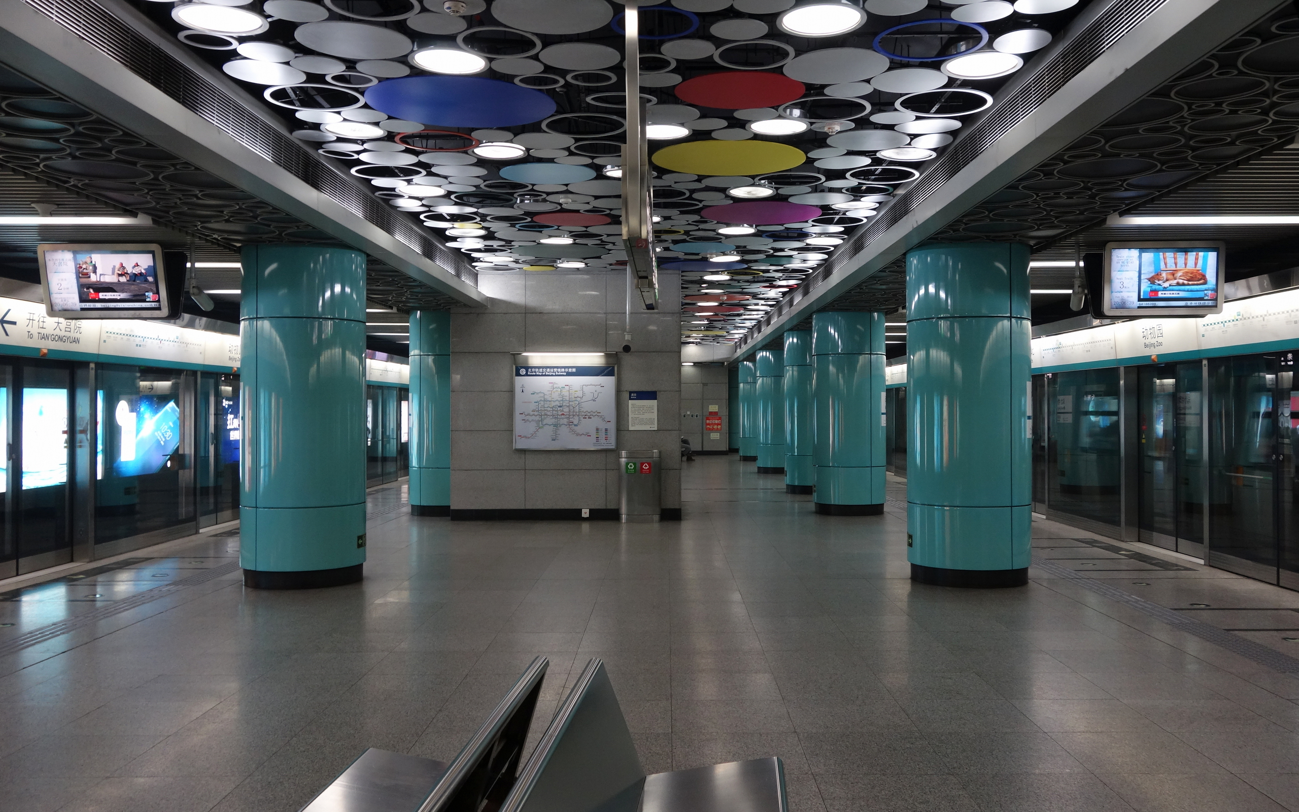 北京地铁4号线动物园站的站台